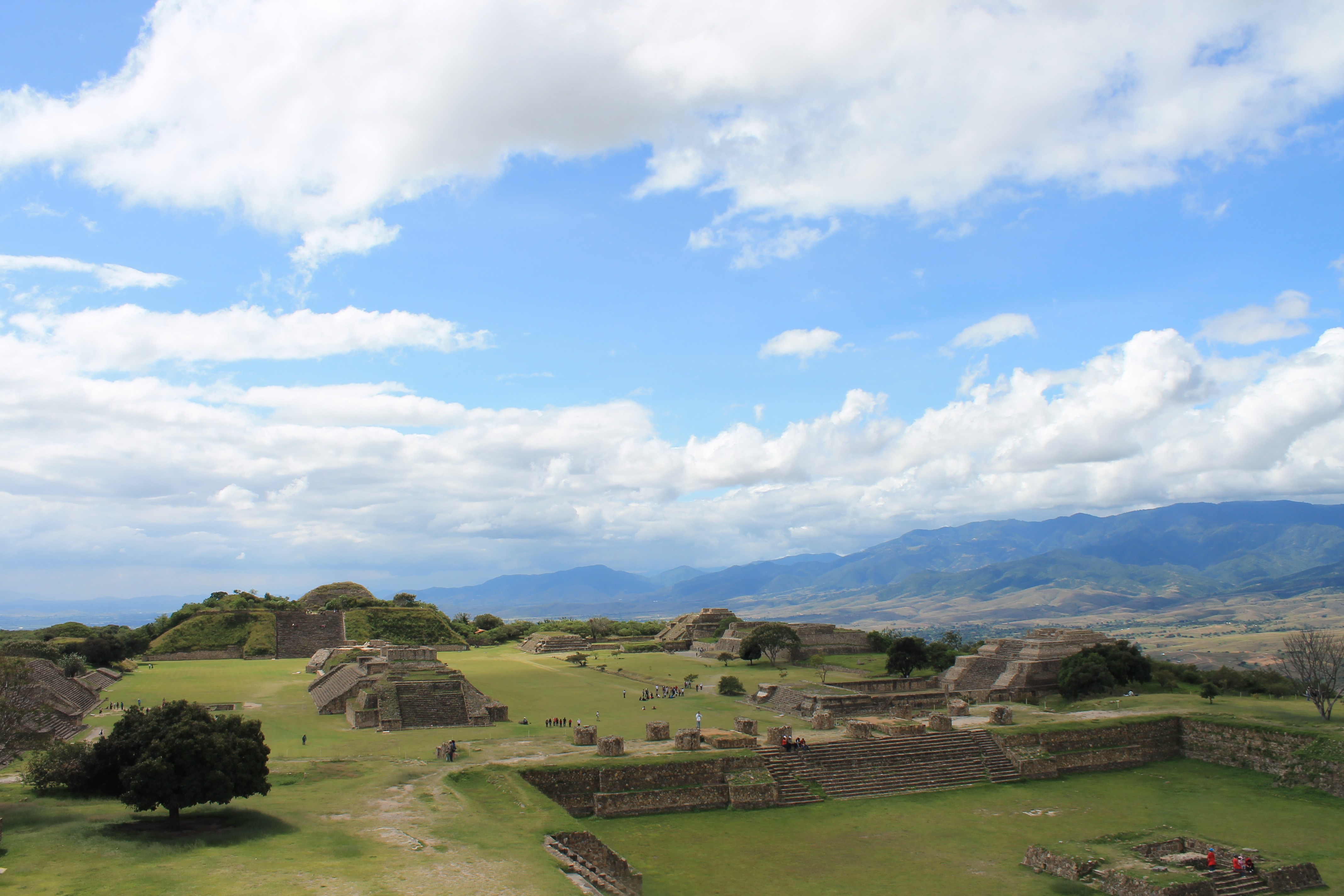 Se muestra una foto de paisaje de Monte Albán, en la cual se puede apreciar parte de la Plataforma Norte, la Gran Plaza y la Plataforma Sur. En la Plataforma Norte se ve en primer plano el Patio Hundido y a la derecha el Pórtico.